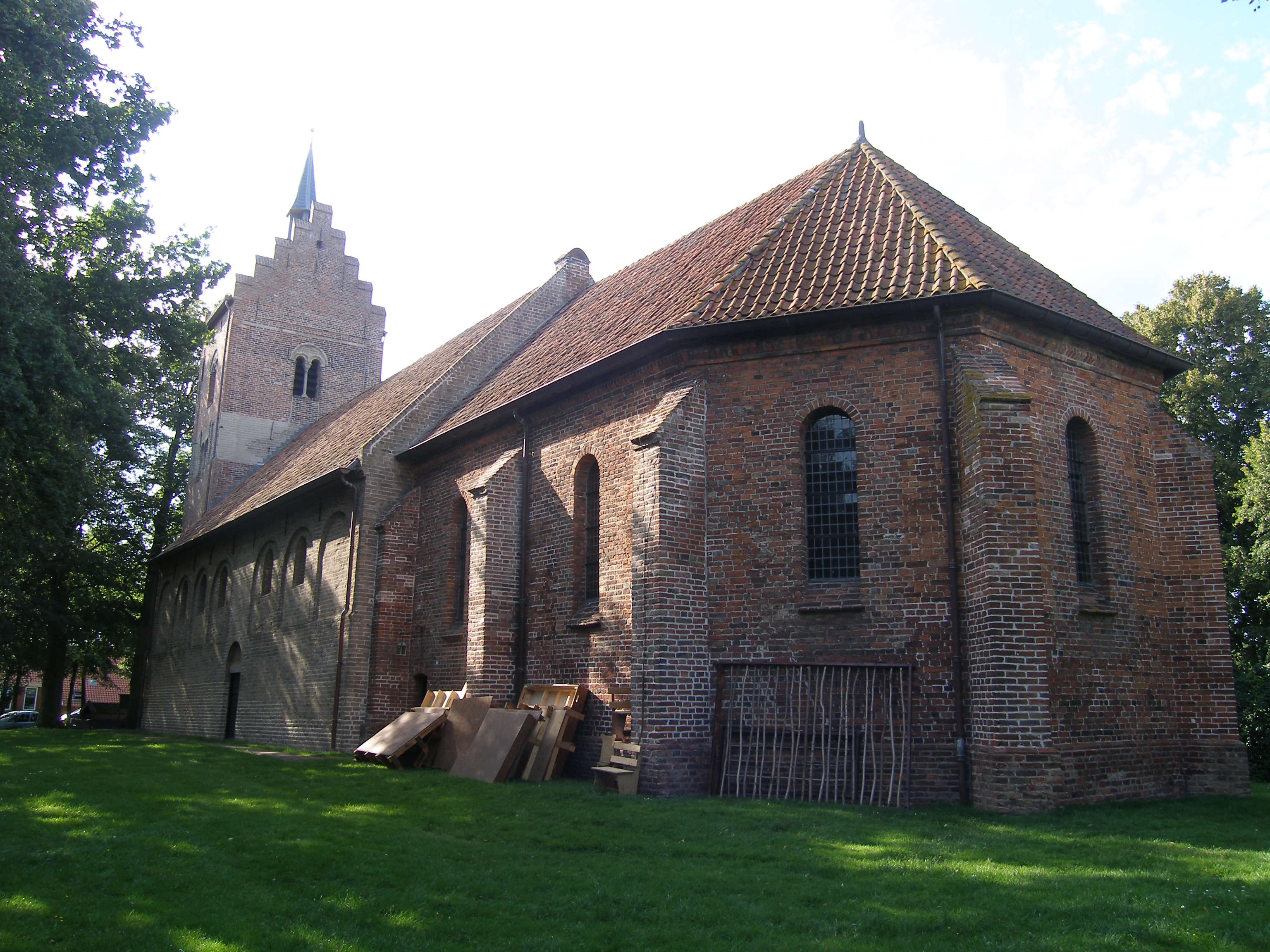 Kerk Anloo